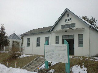 경원선 월정리역 역사